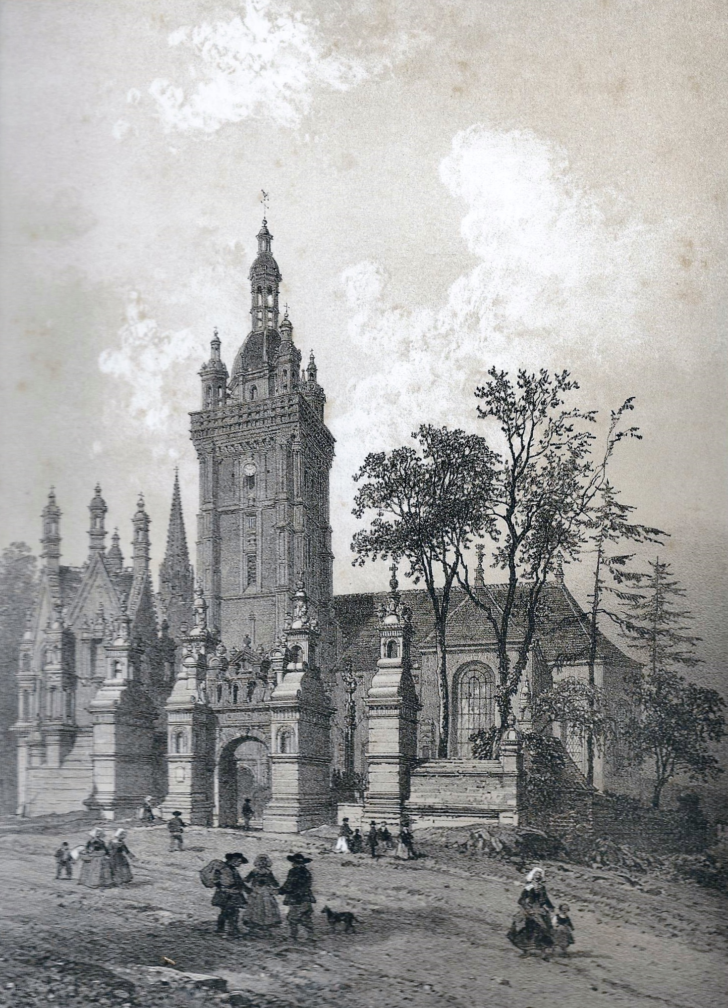 Église de Saint-Thégonnec (Finistère) (dessin d'Eugène Cicéri, publié dans Félix Benoist, "La Bretagne contemporaine", tome "Finistère", 1867).